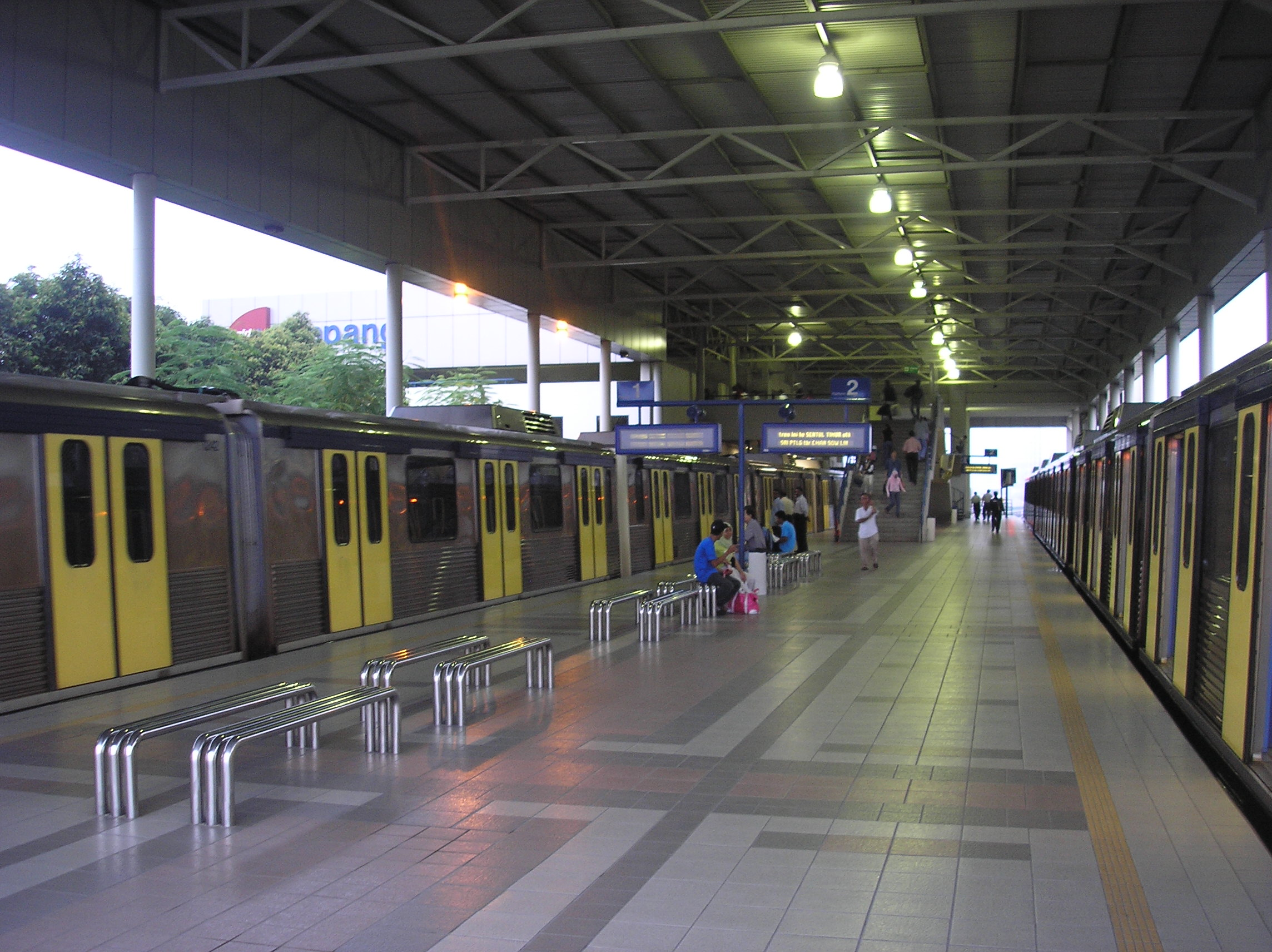 The Ampang LRT terminal (Ampang Line), Selangor, Malaysia.